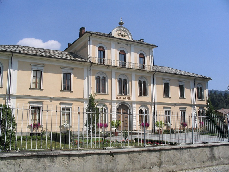 Torre Pellice (Piemont, Włochy) - siedziba władz Kościoła waldensów